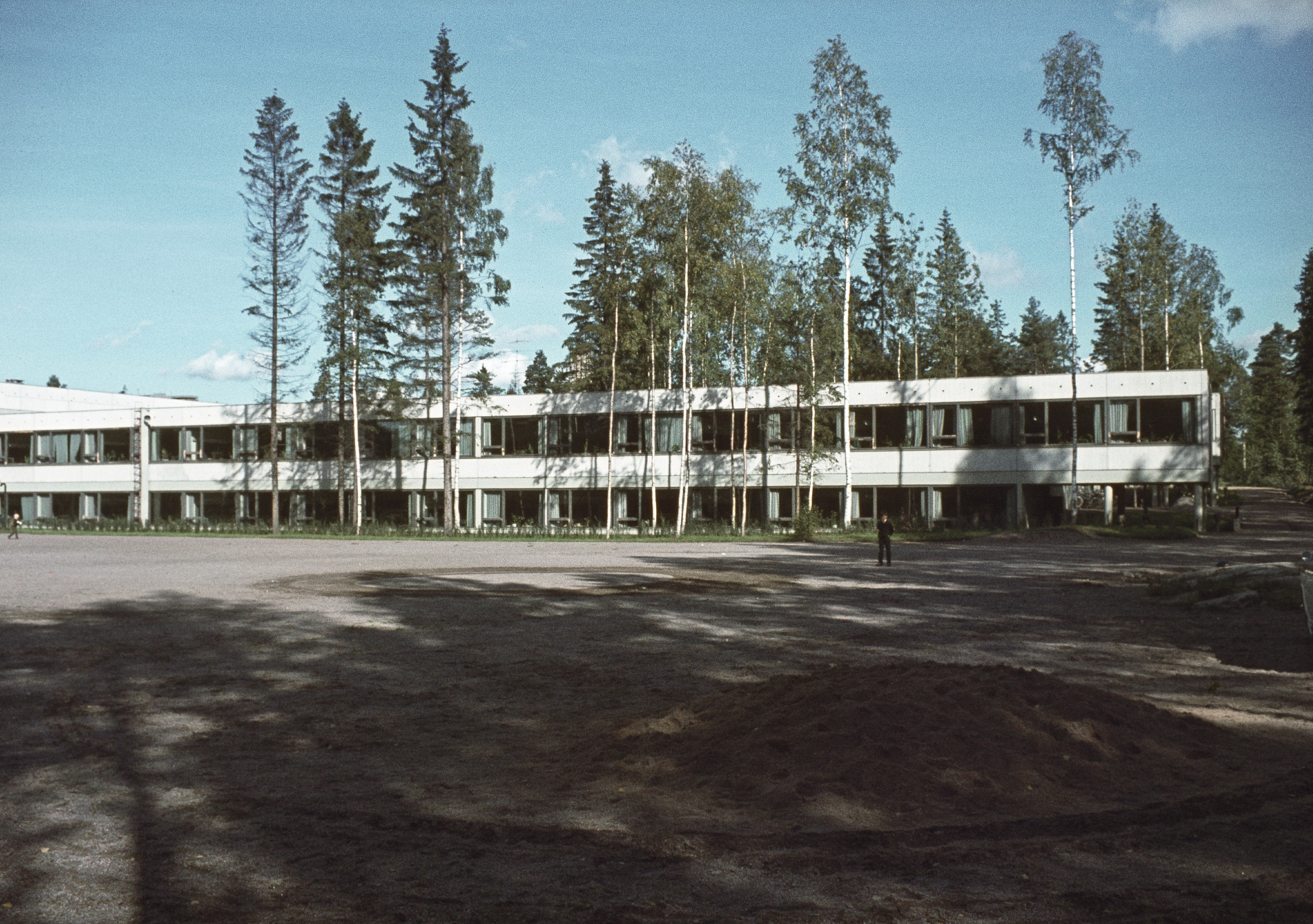 Helsingin Suomalais-venäläinen koulu, Kaarelankuja 2.